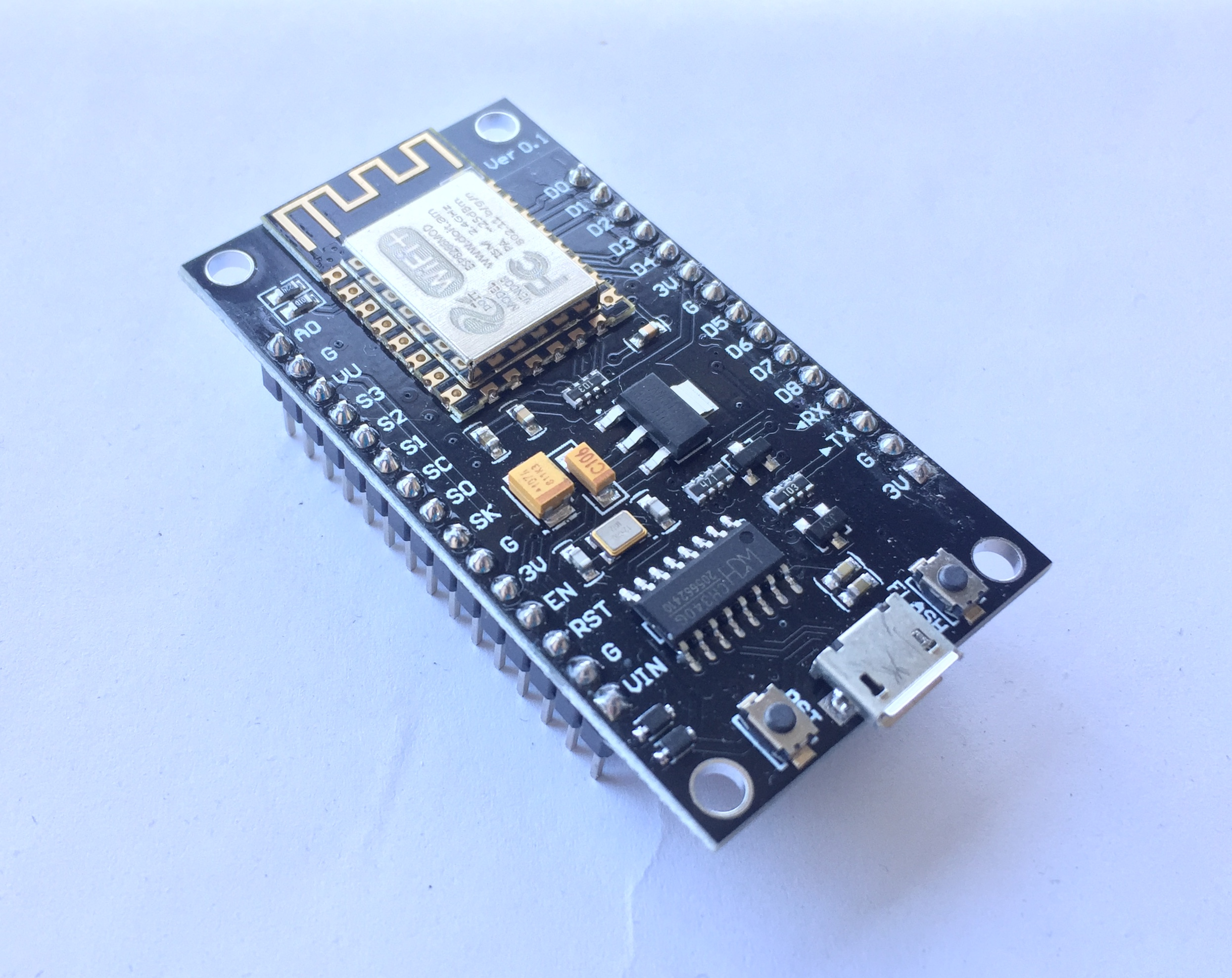 NodeMCU DevKit V3